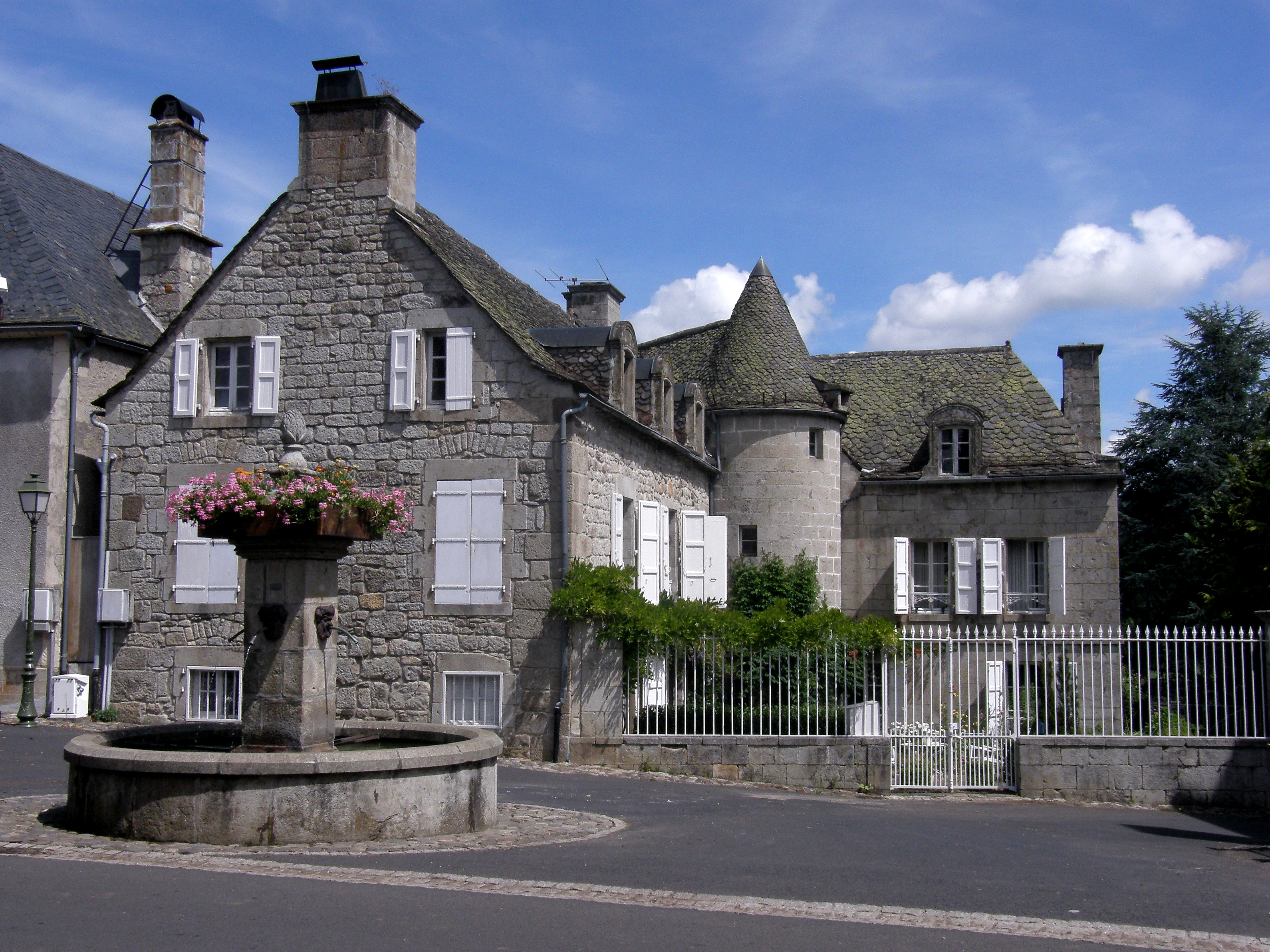 Menet jolie maison dans le village.